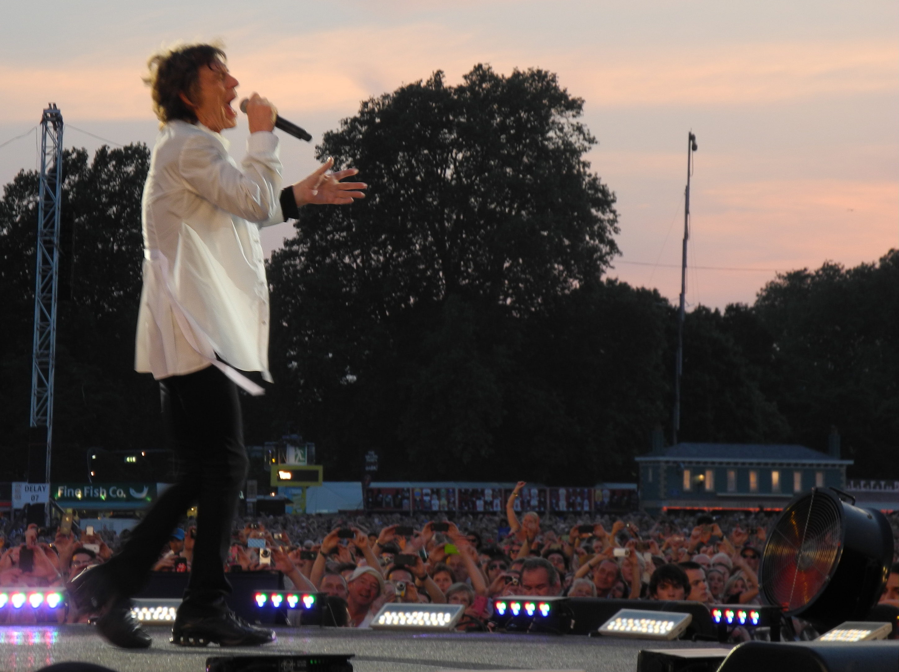 Concerto dei Rolling Stones ad Hyde Park per il tour '50 and counting...' del 2013, Mick Jagger